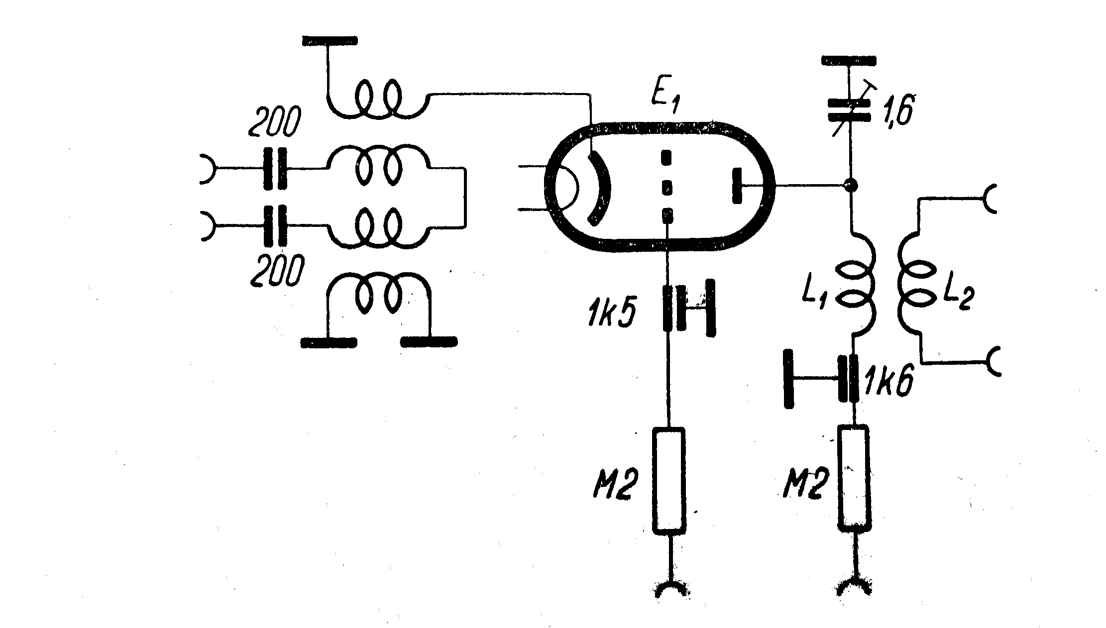 Grid grounded triode HF amplifier